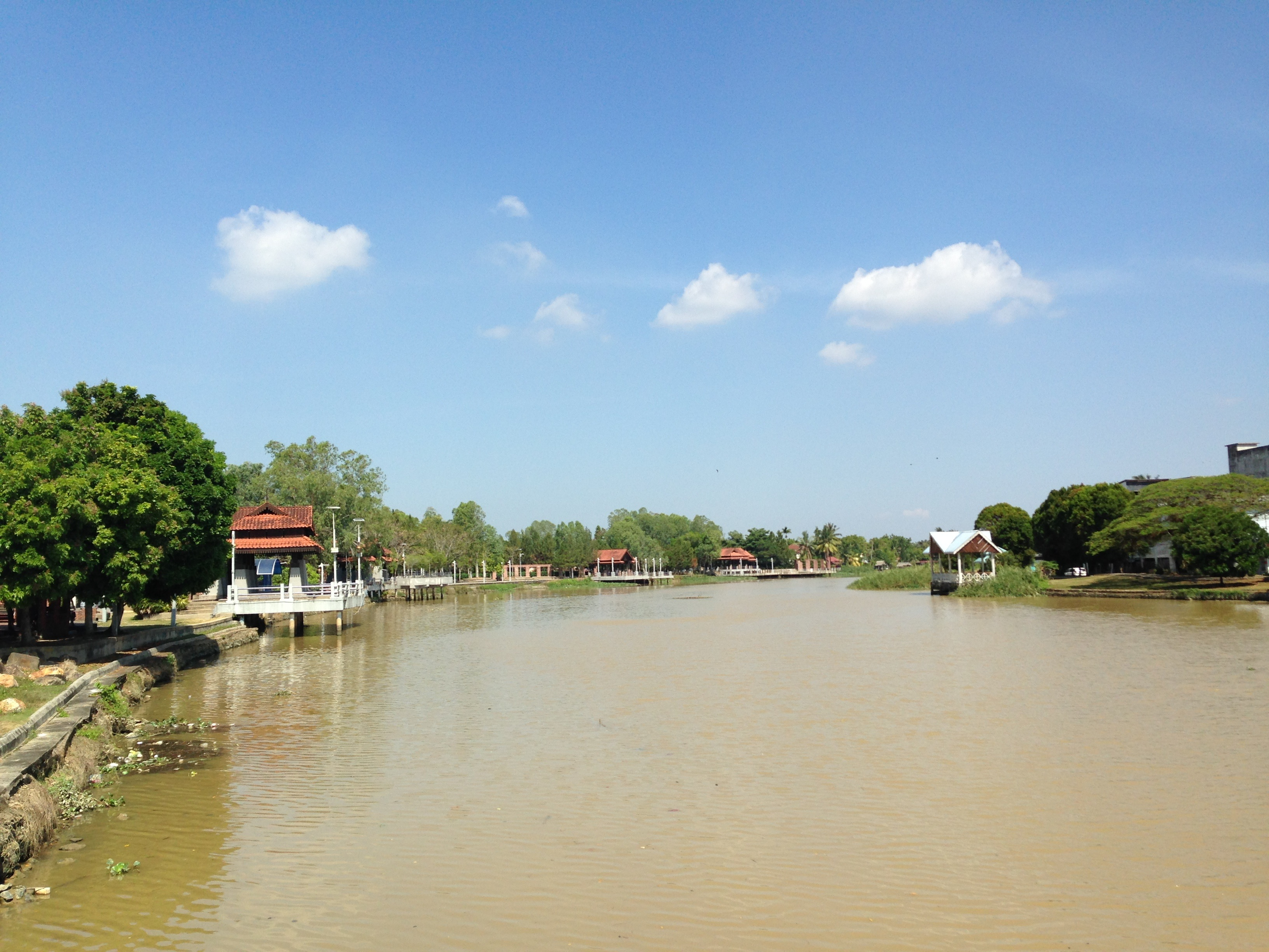 吉輦河一景